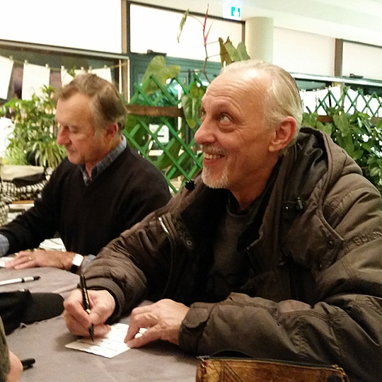 Tom Novembre le 7 décembre 2018 à l'issue de la représentation de Fausse Note avec Christophe Malavoy